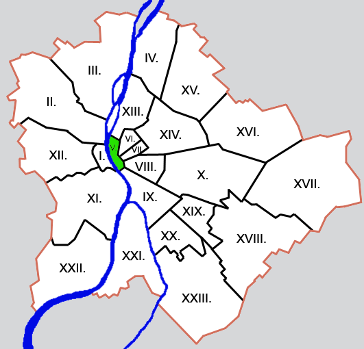 Budapest kerületei: V. kerület